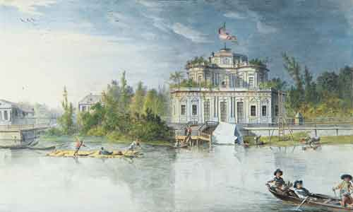 Ж. Б. де ла Траверс. Дача А. С. Строганова. 1790. Бумага, акварель. Из альбома семьи Строгановых. Архитектор А. Ринальди. 1754